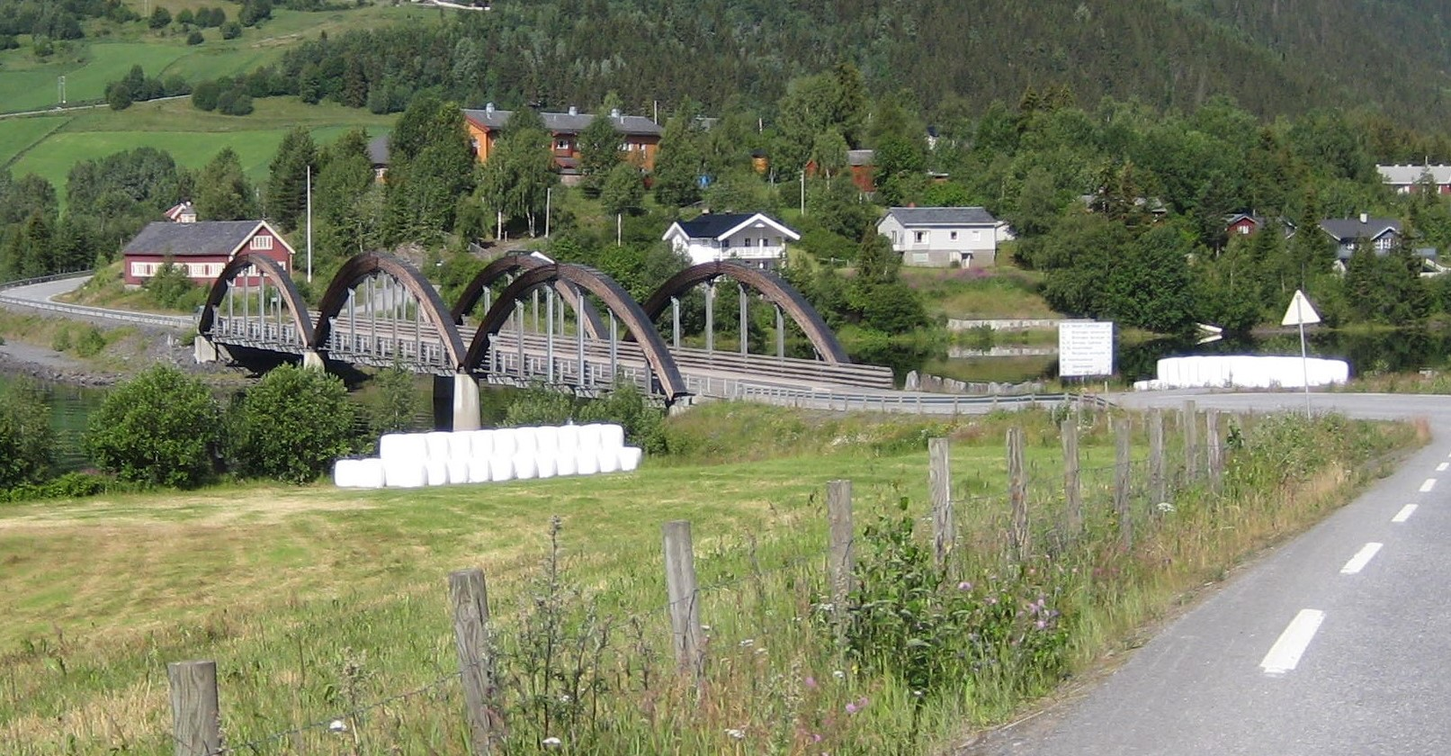 Ulnes bru over Strondafjorden